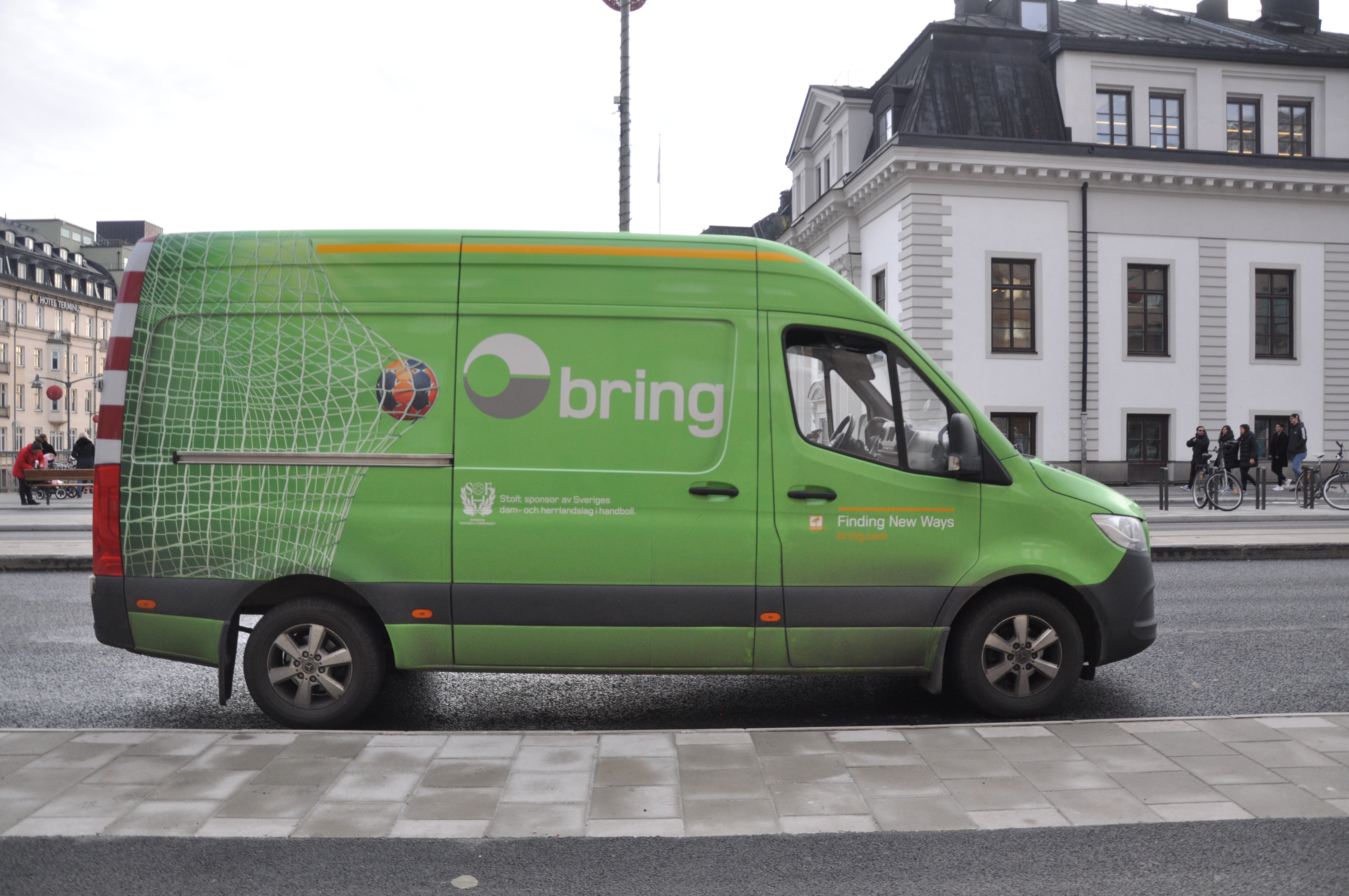 En bring-bil i Stockholm.